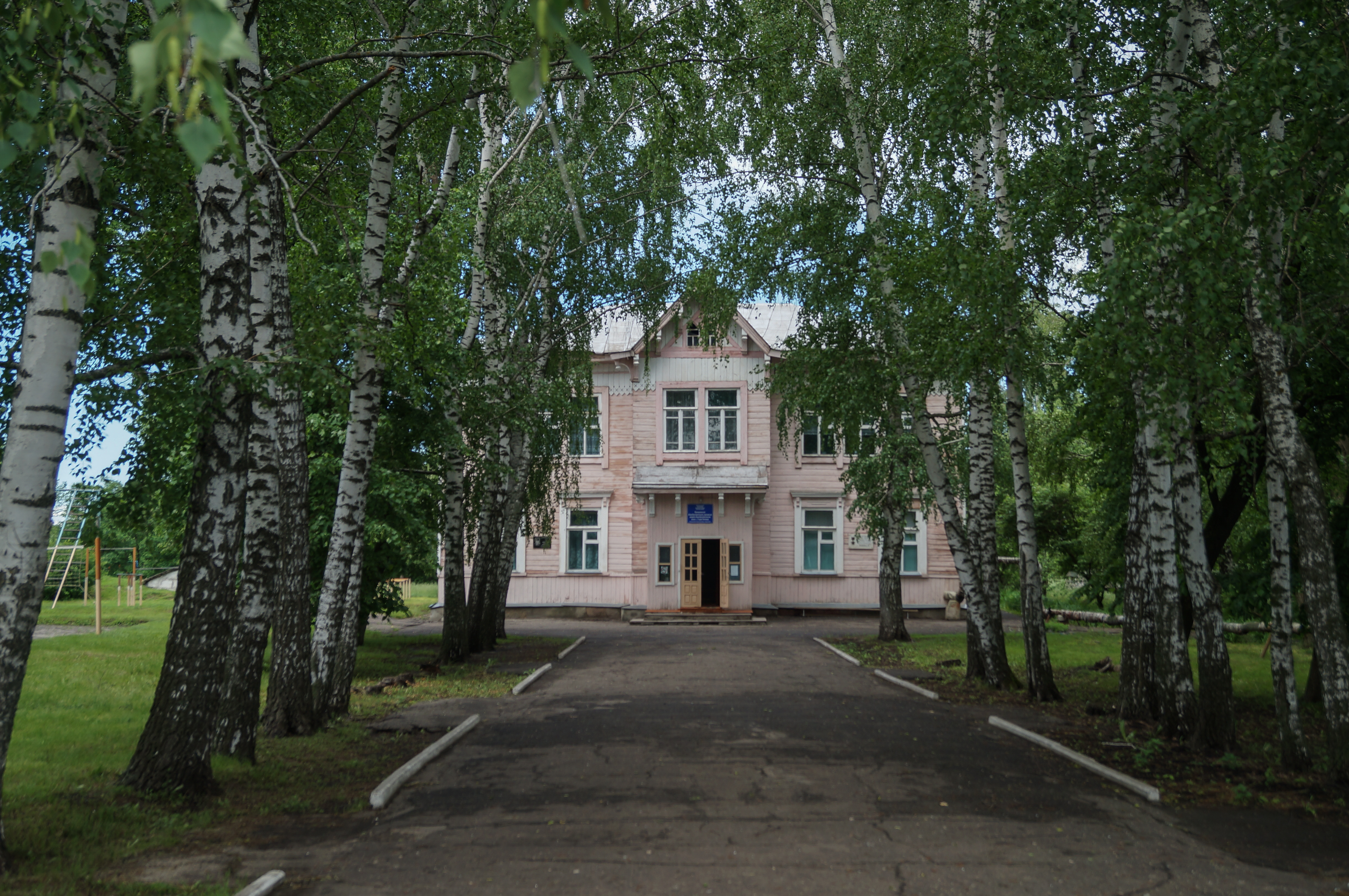 Школа: Старая Потловка, Колышлейский район, Пензенская область